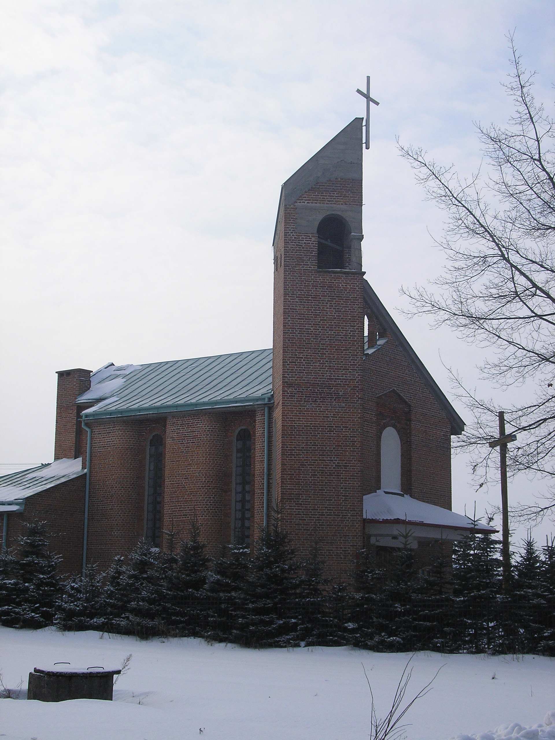 church in Chrzachów